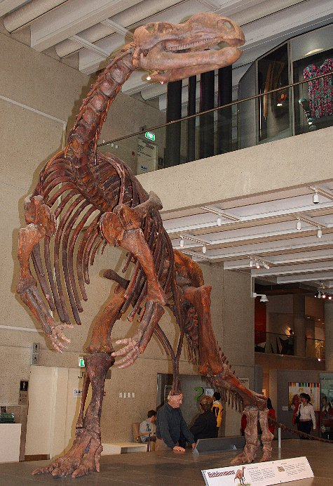 Muttaburrasaurus skeleton Queensland Museum Photo: Cas Liber